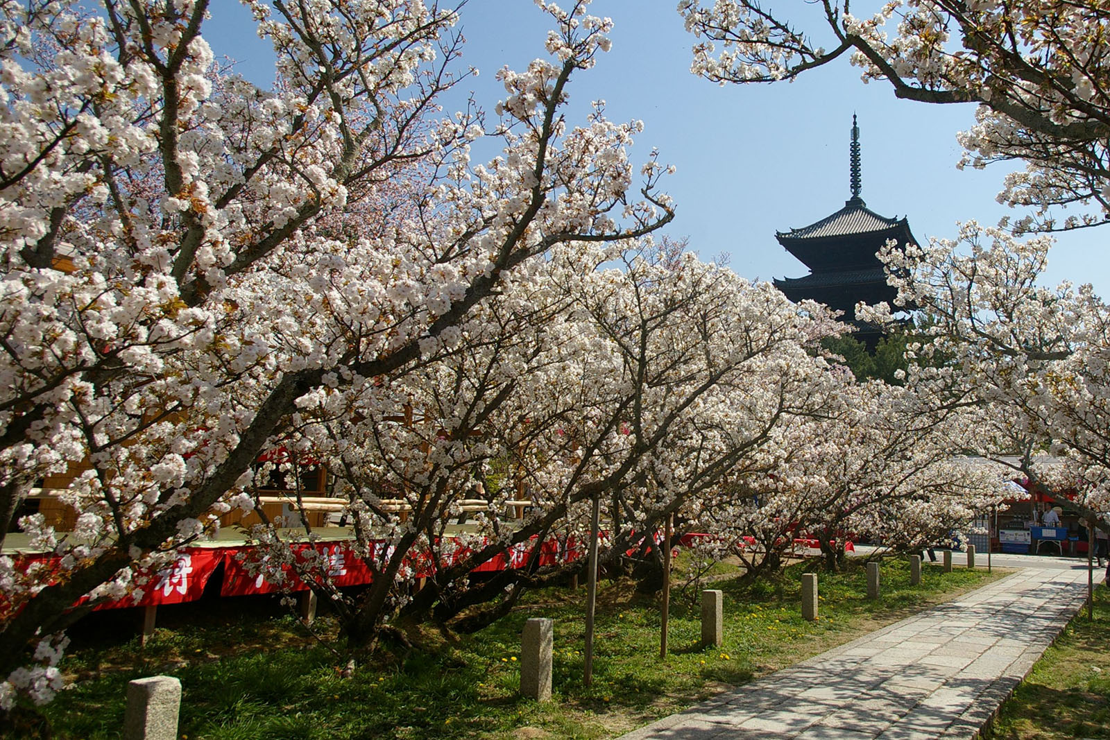 Omurosakura at Ninna-ji